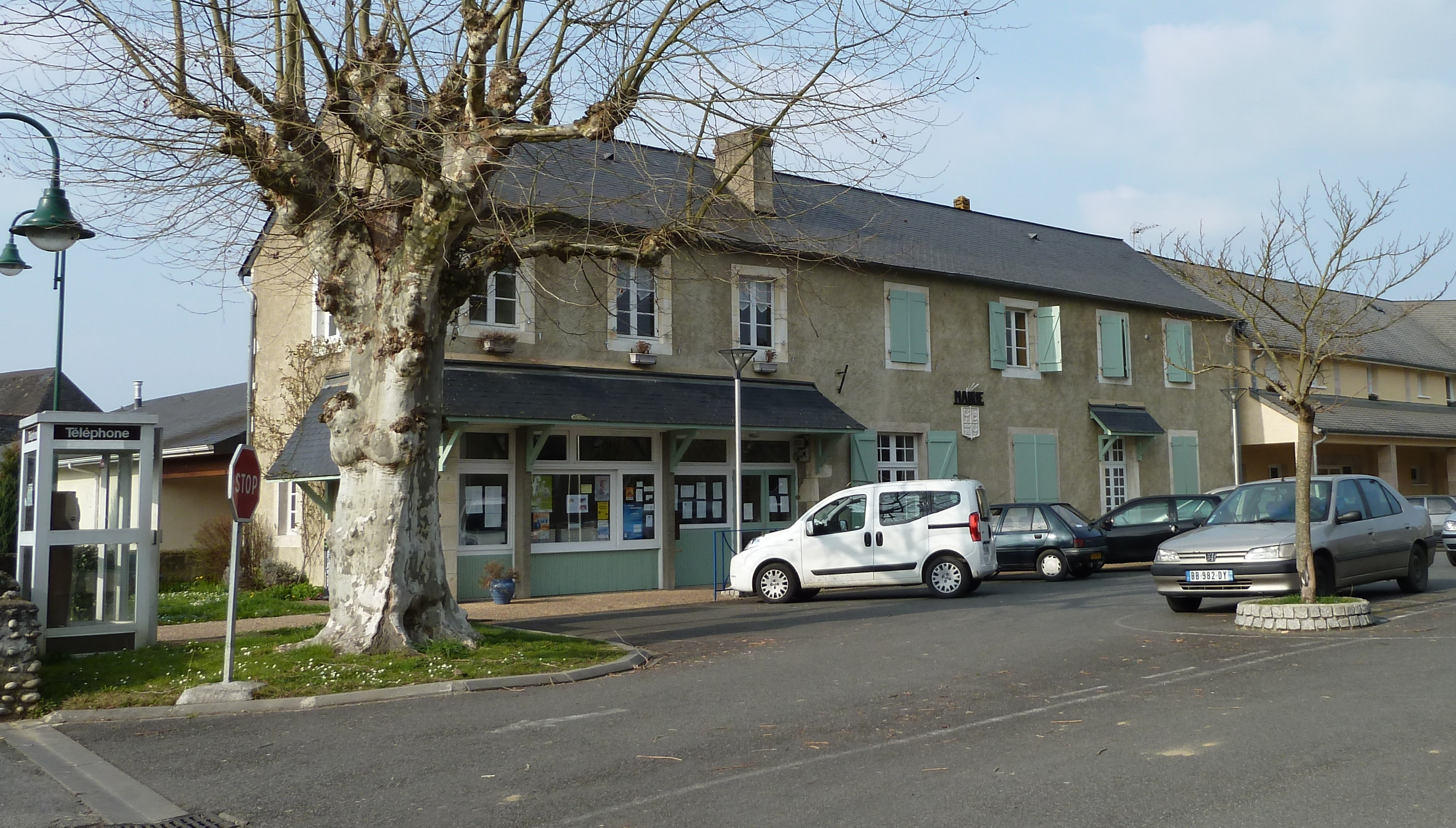 Mairie d'Artiguelouve